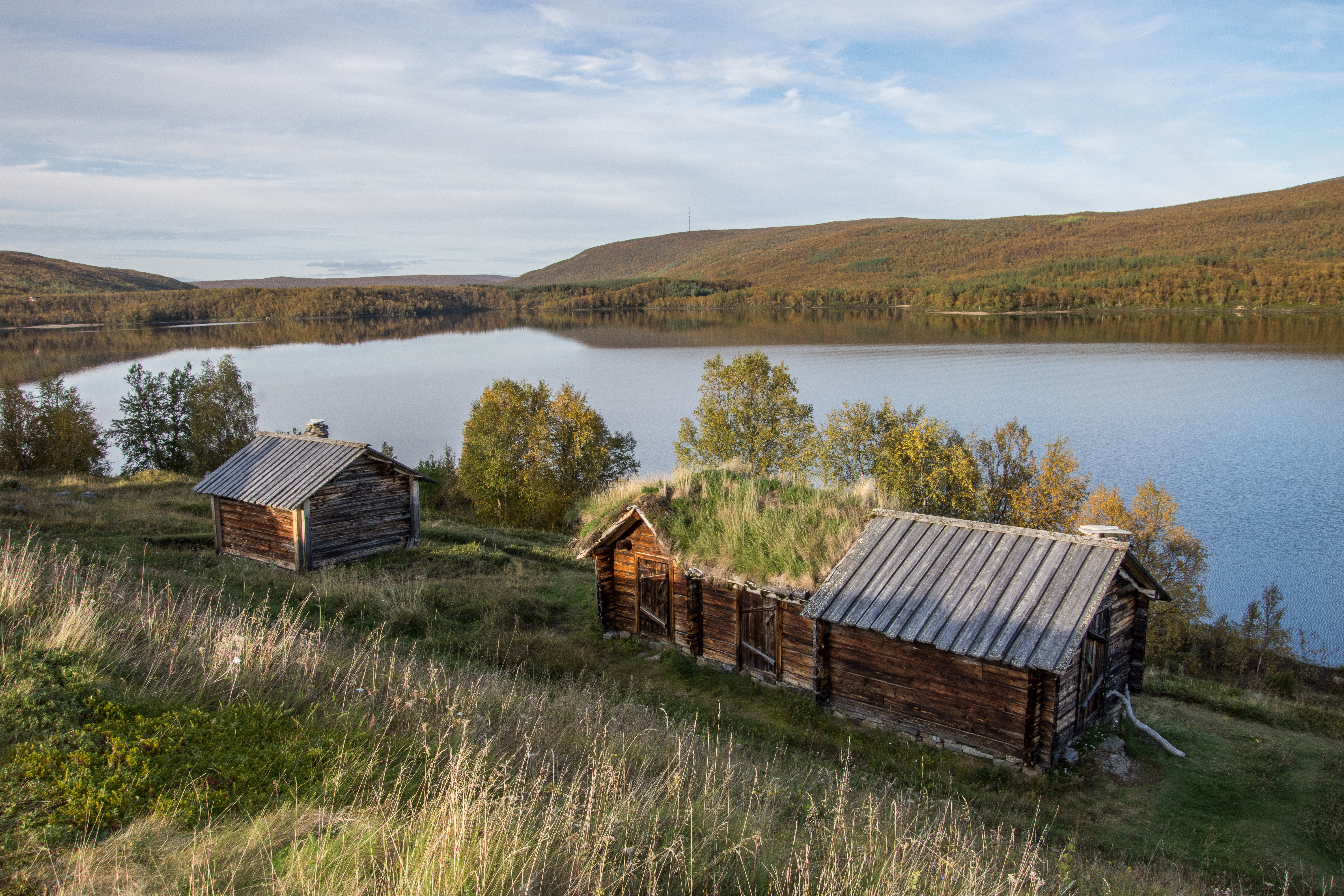 Utsjoen kirkkotuvat